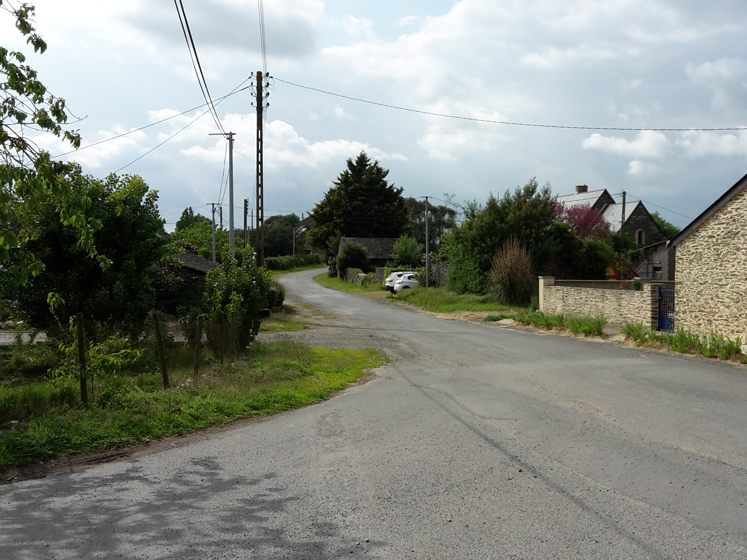 Rochementru, Le Pin, Loire-Atlantique, France.